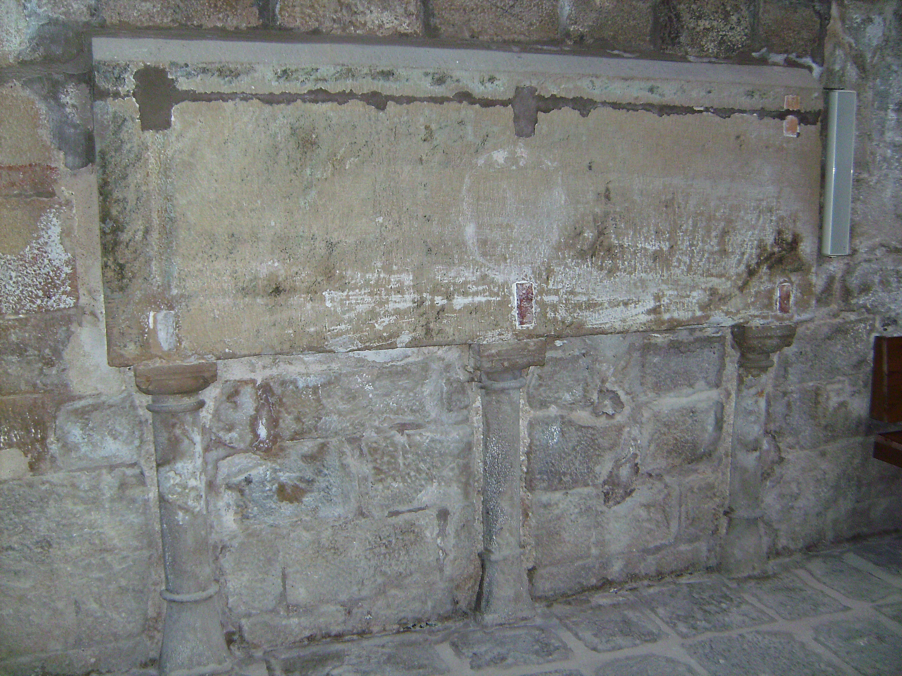 Real Monasterio de Santa Maria de Vallbona - Sepulcro de Sancha de Aragon